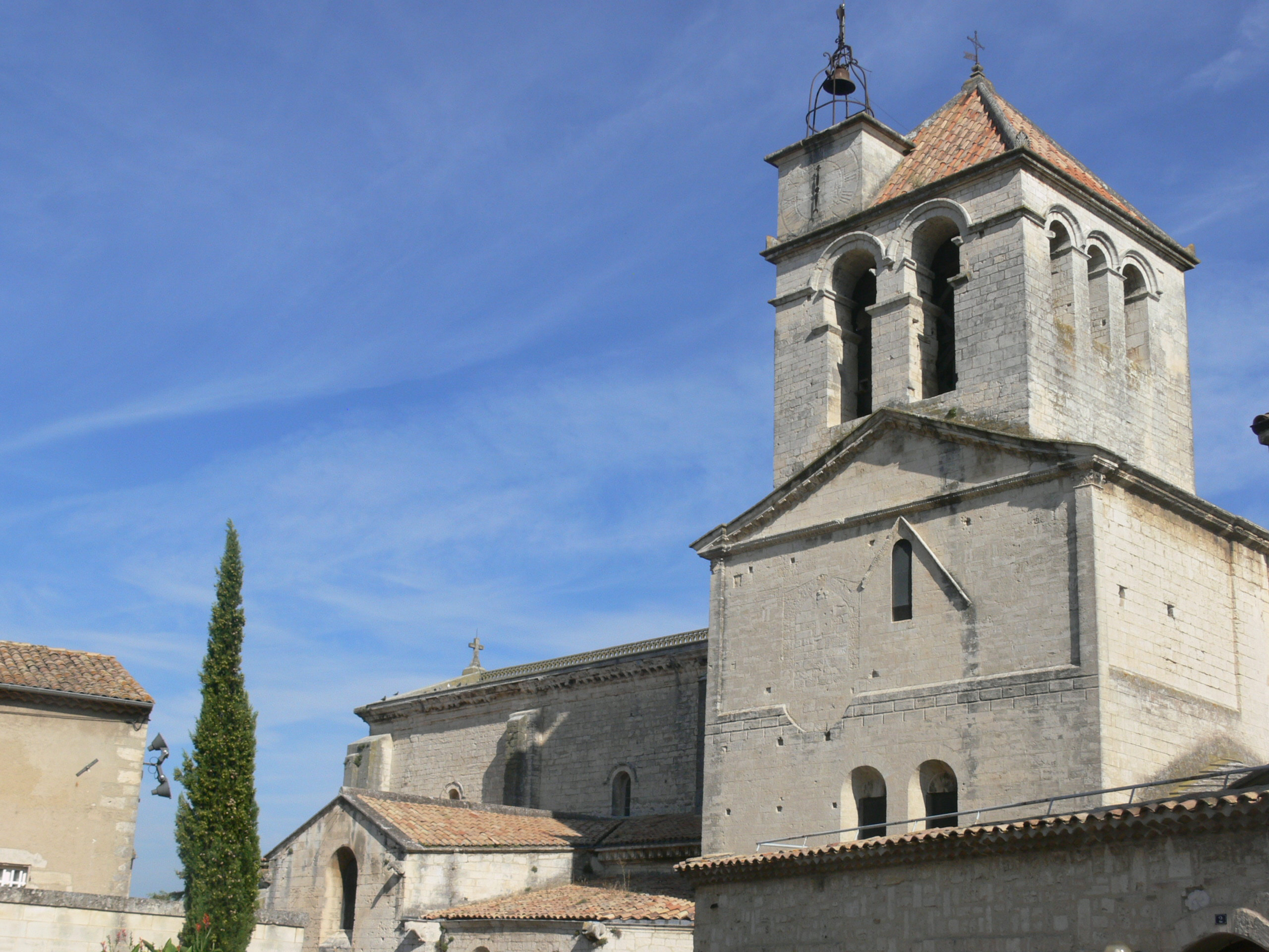 Saint-Paul-Trois-Châteaux - cathédrale